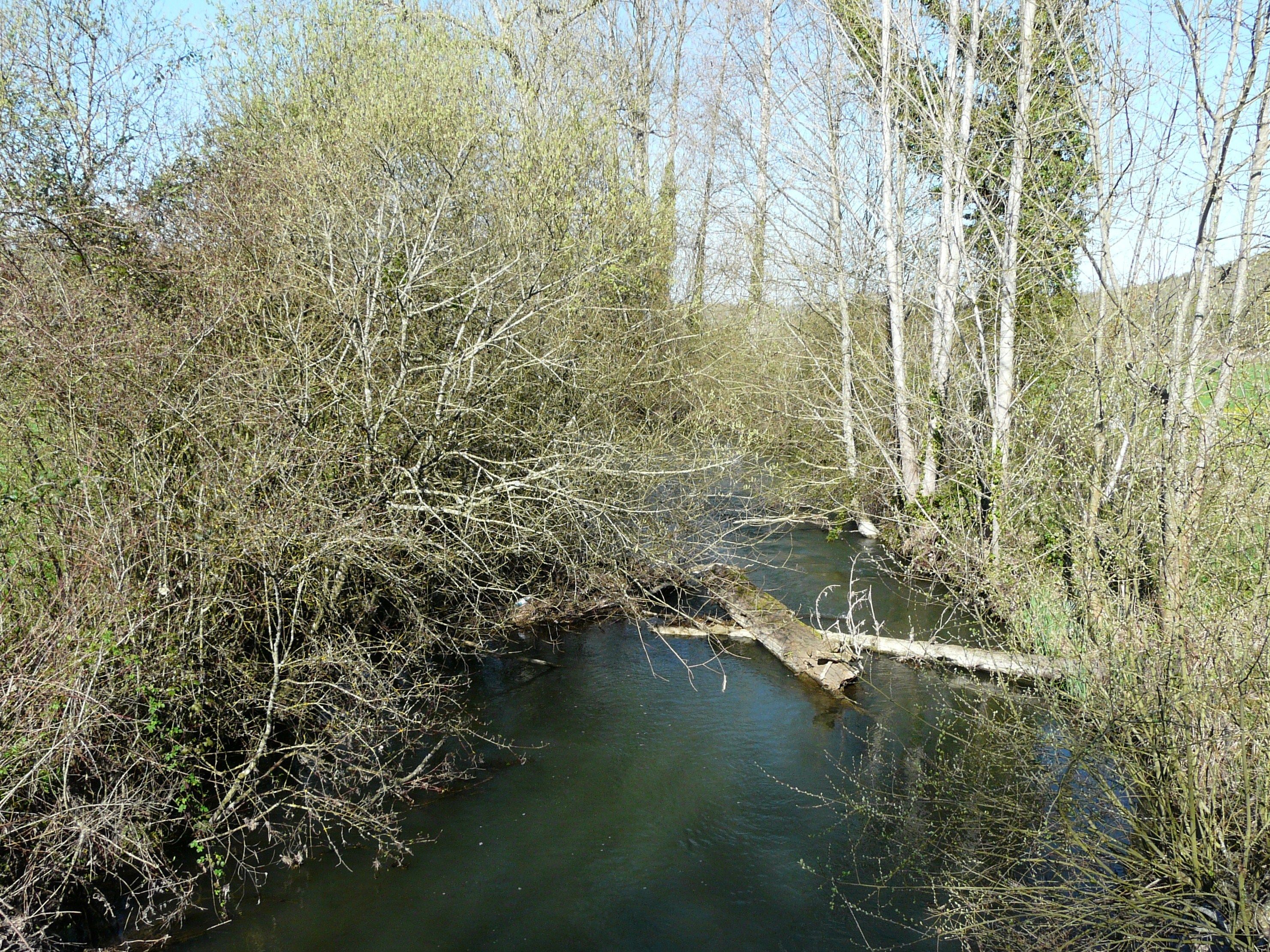 Le Vern près du lieu-dit Combalou, en limites de Vallereuil (à gauche) et Neuvic (à droite) ; Dordogne, France. Vue prise en direction de l'aval.